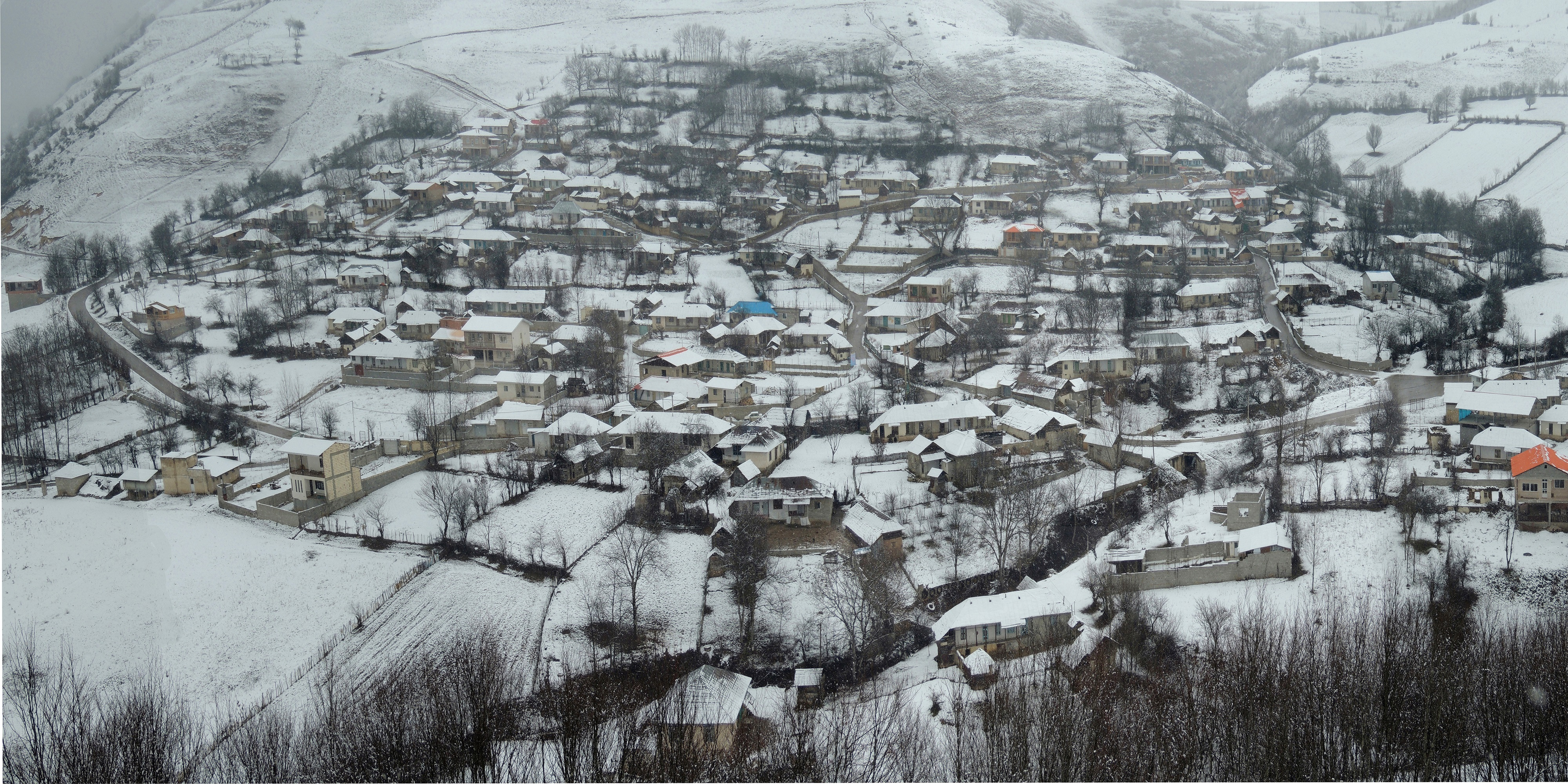 عکس توسط الف میم پاشا در زمستان 1390گرفته شده است